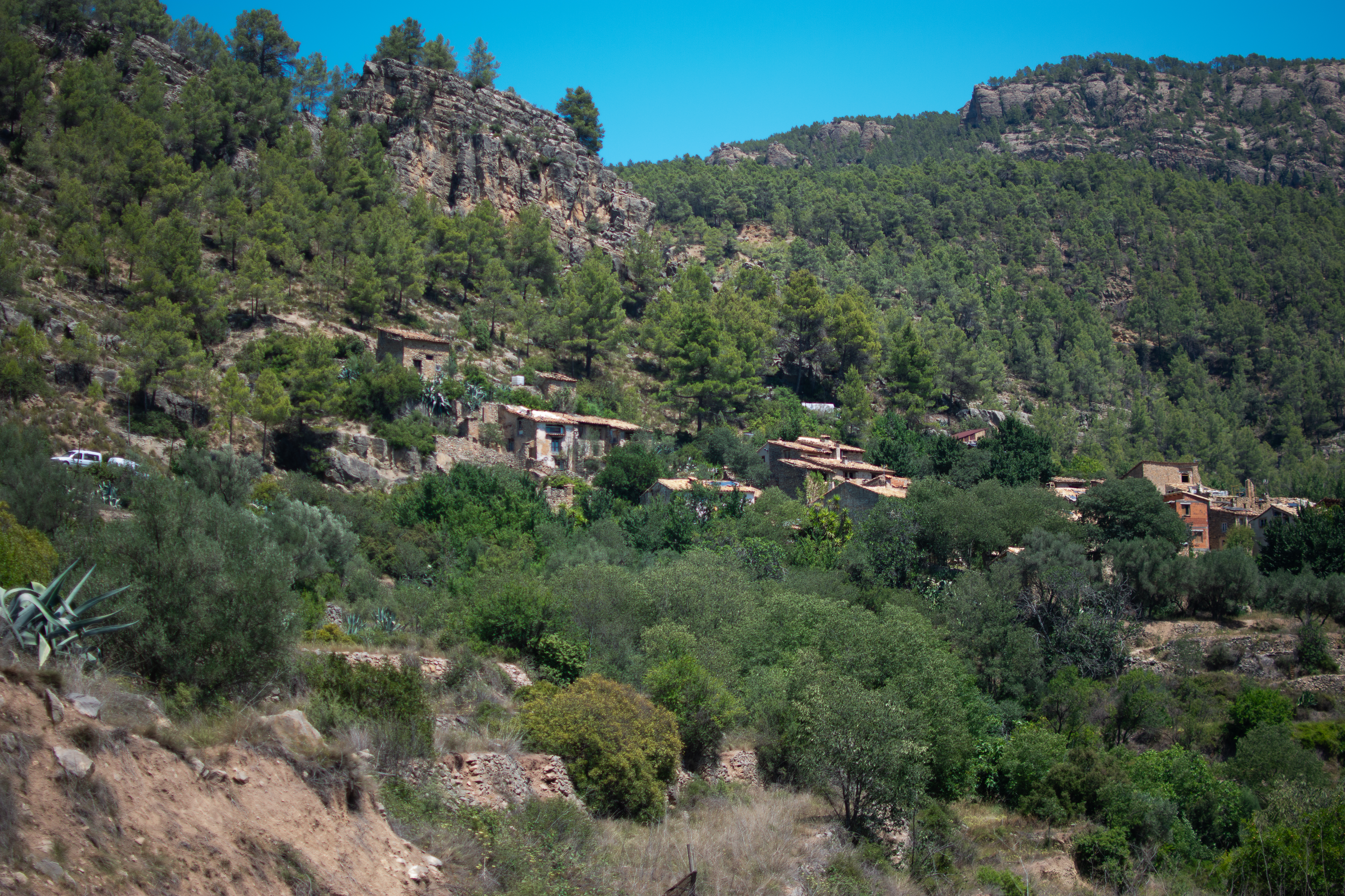 La Artejuela, pedanía de Arañuel (Castellón).